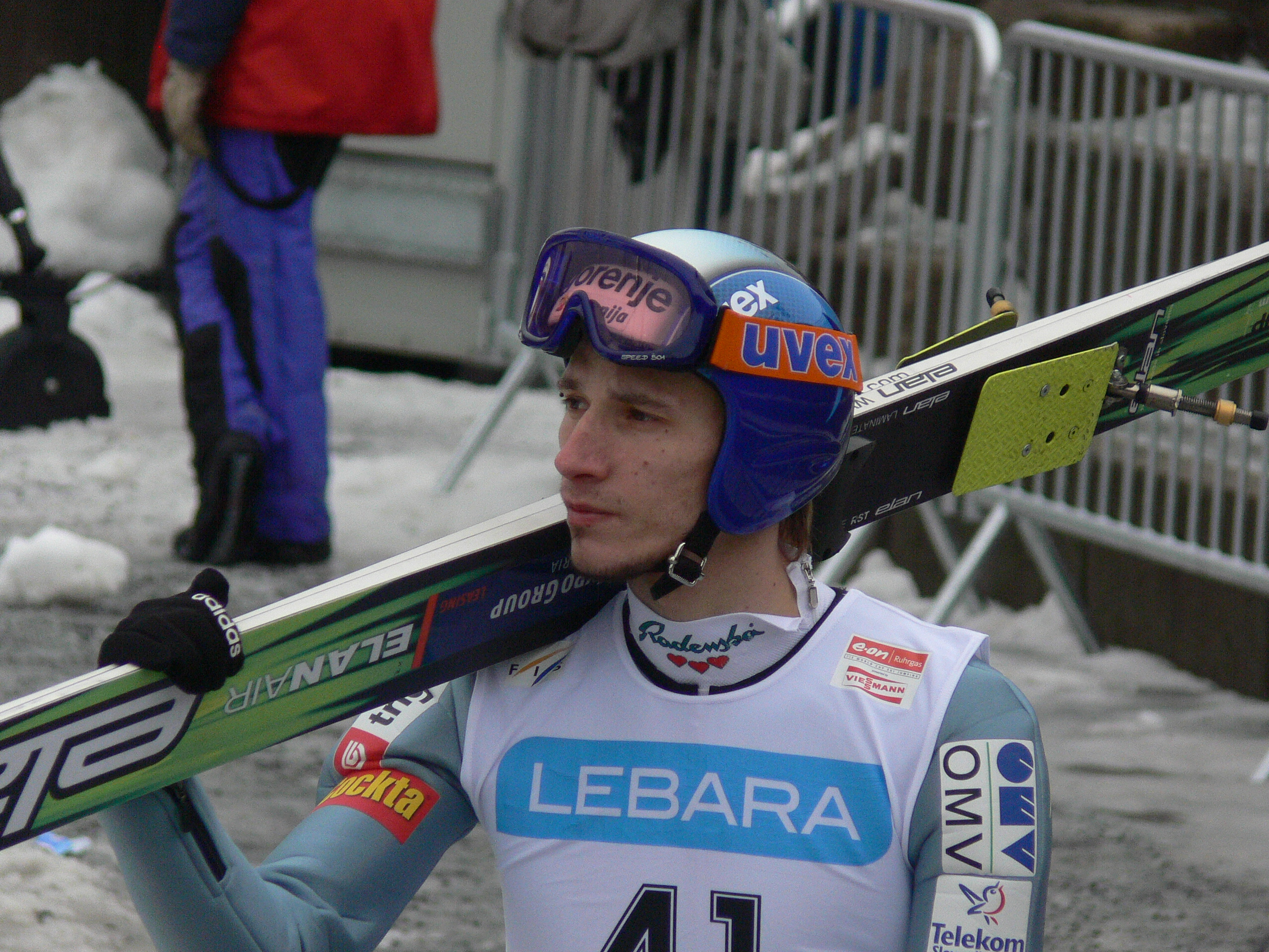 Robert Kranjec at the 2008 World Cup ski jumping event in Holmenkollen, Oslo.